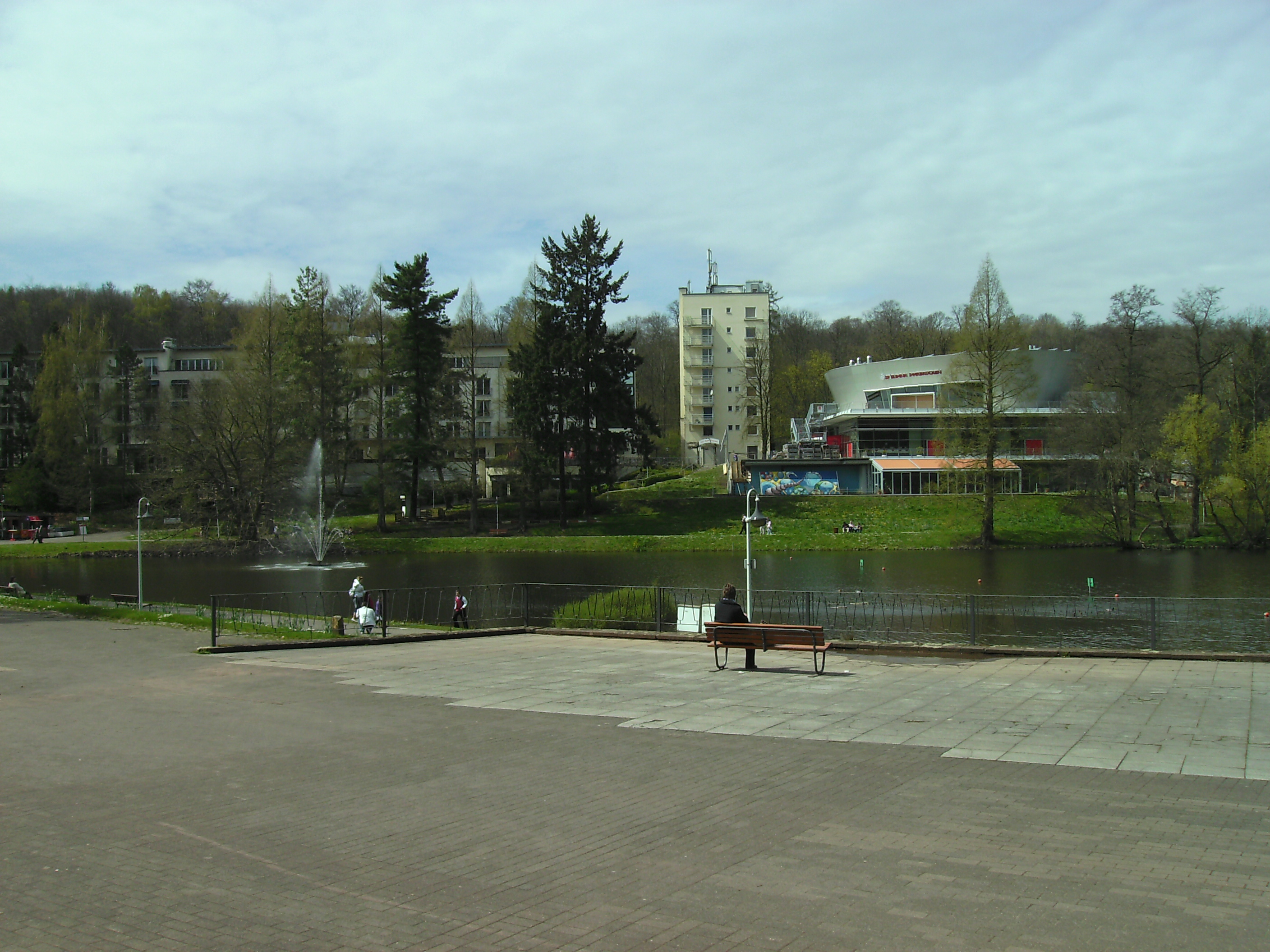 Saarbrücken: Deutsch-Französischer Garten, Kernbereich mit Hotel und Spielbank